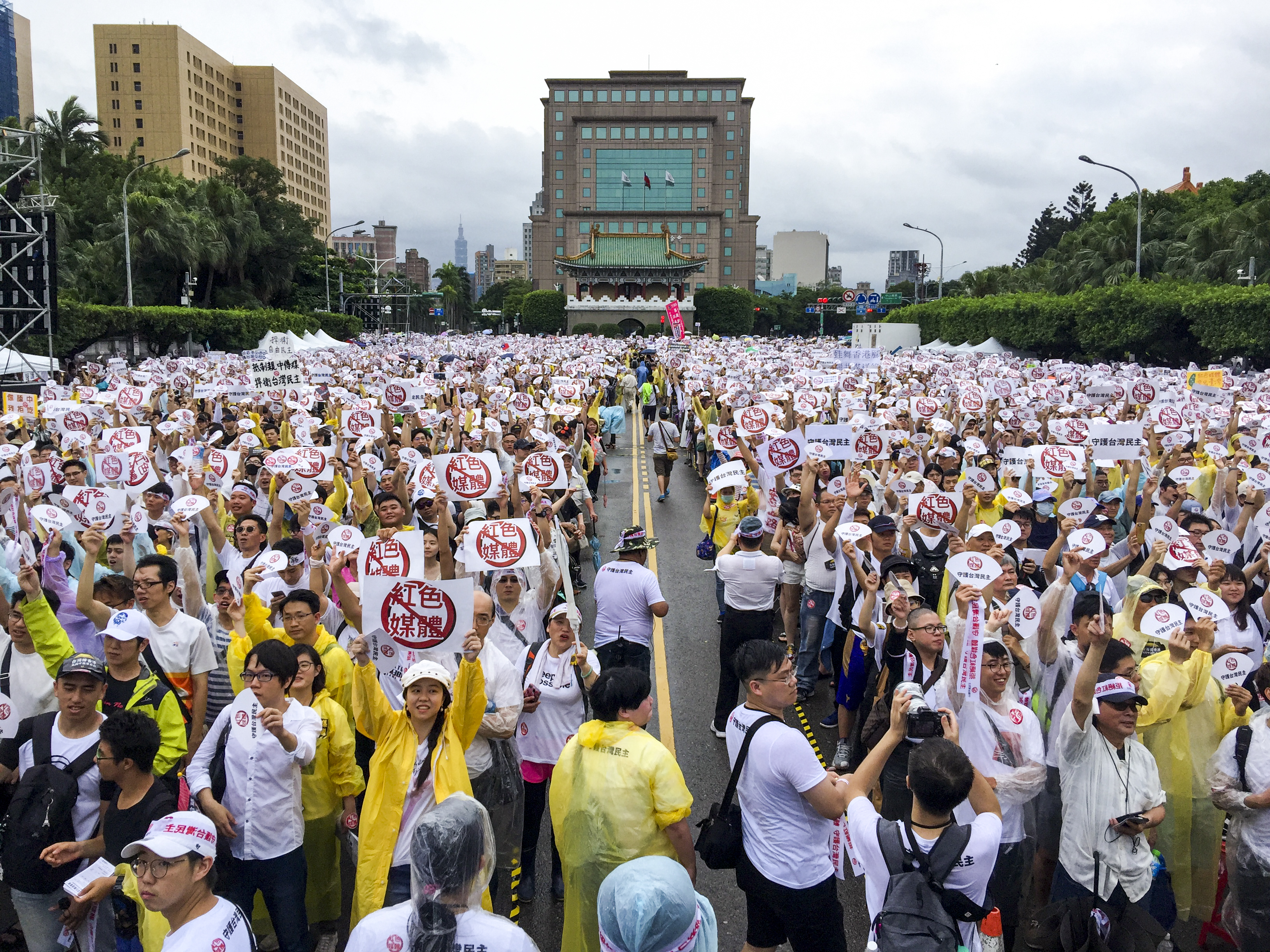 台灣上萬群眾要求拒絕紅色媒體